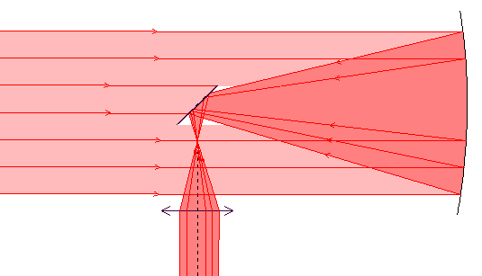 Schéma télescope de Newton (schéma personnel) Catégorie:Schéma de physique